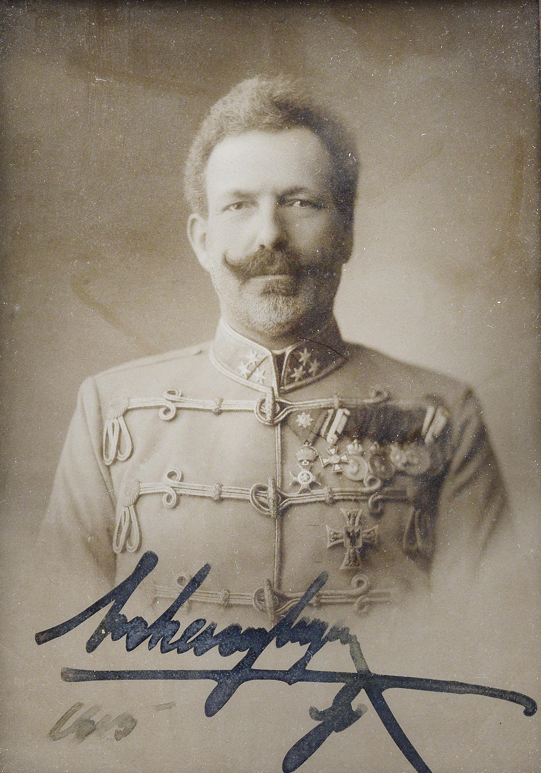 Hoch- und Deutschmeister Erzherzog Eugen - Geschenkphoto mit eigenhändiger Unterschrift, Darstellung als General in ungarischer Adjustierung, eigenhändige Unterschrift "Erzherzog Eugen", 19 x 13 cm